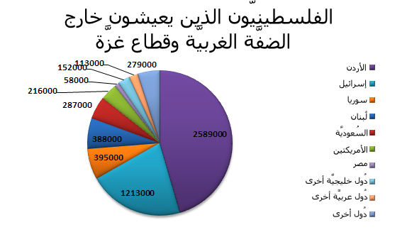 رسمٌ بيانيّ دائريّ يُظهرُ نسبة الشتات الفلسطيني خارج فلسطين.